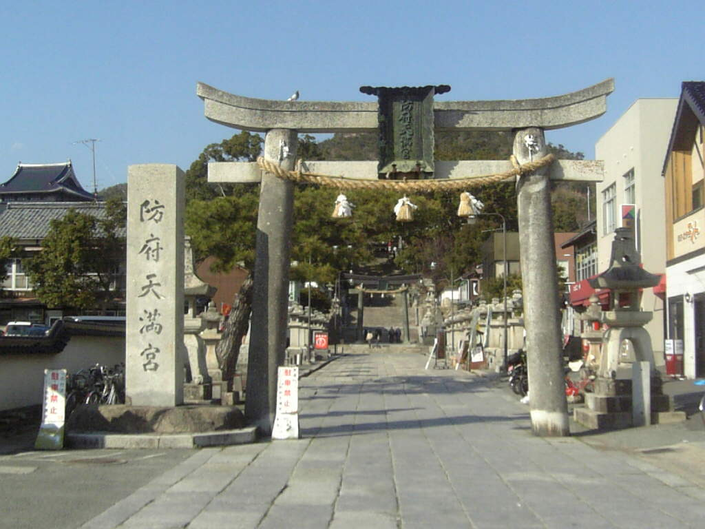 防府天満宮